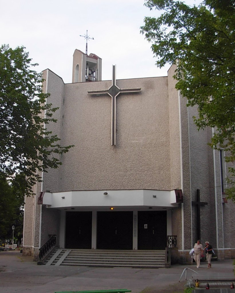 Cmentarz Nowofarny Bydgoszcz, kościół św. Krzyża